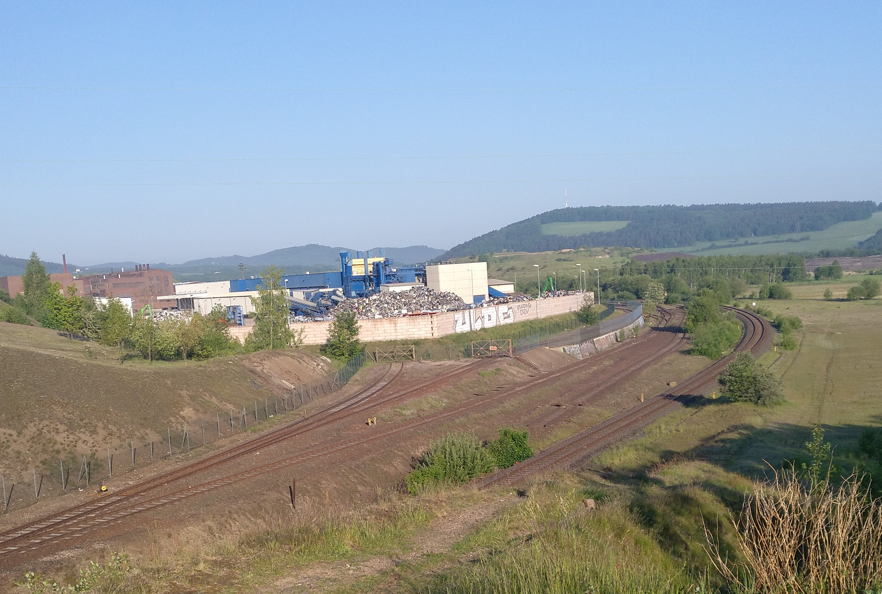 Stark verzweigte, stillgelegte Nebenstreckenlandschaft an der Zinkhütte Harlingerode (mit Electrocycling GmbH im Vordergrund); im Hintergrund gut sichtbar der Sudmerberg